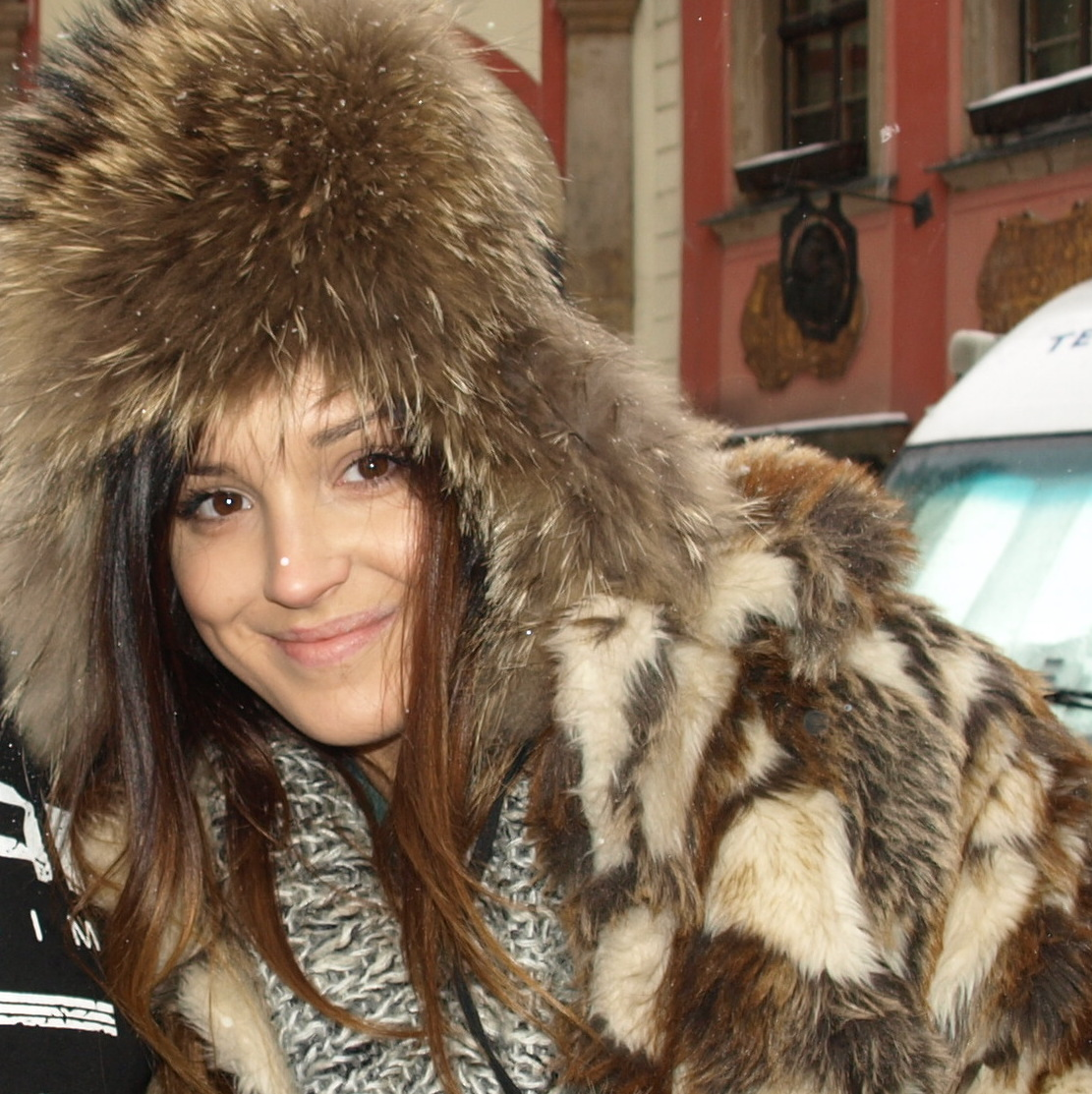 Marina Łuczenko w 2010 roku